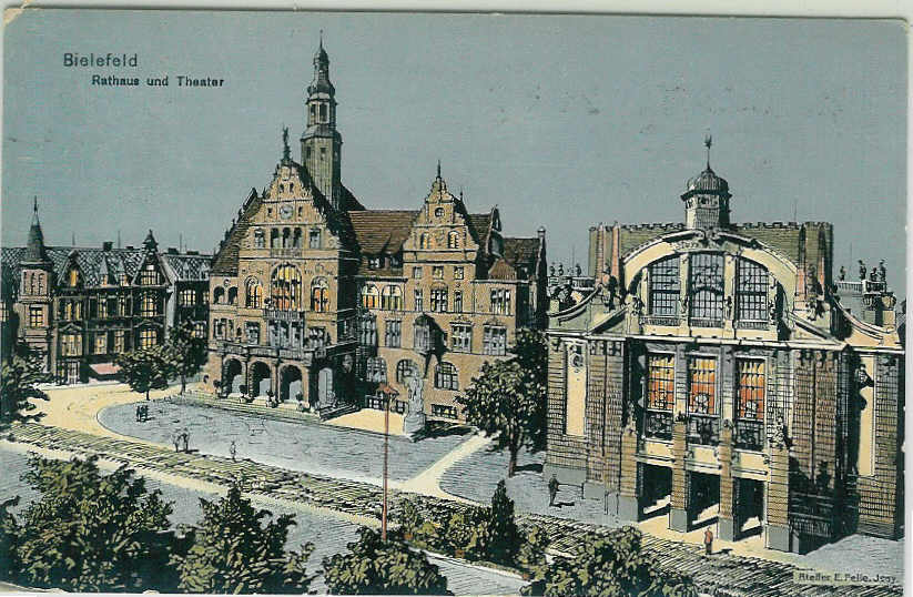 Ansichtskarte, Bielefeld Künstlerkarte "Mondnacht" von 1910. Signiert Atelier E. Felle. Postkarte ist gestempelt in Leipzig 1913.